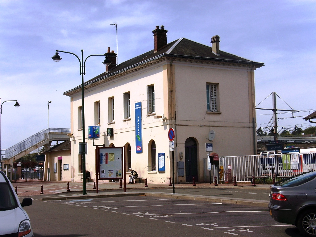 Bâtiment principal de la gare de Dourdan